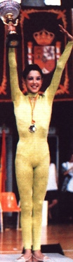 La gimnasta española Tania Lamarca en el Campeonato de España Individual en Guadalajara (1994).